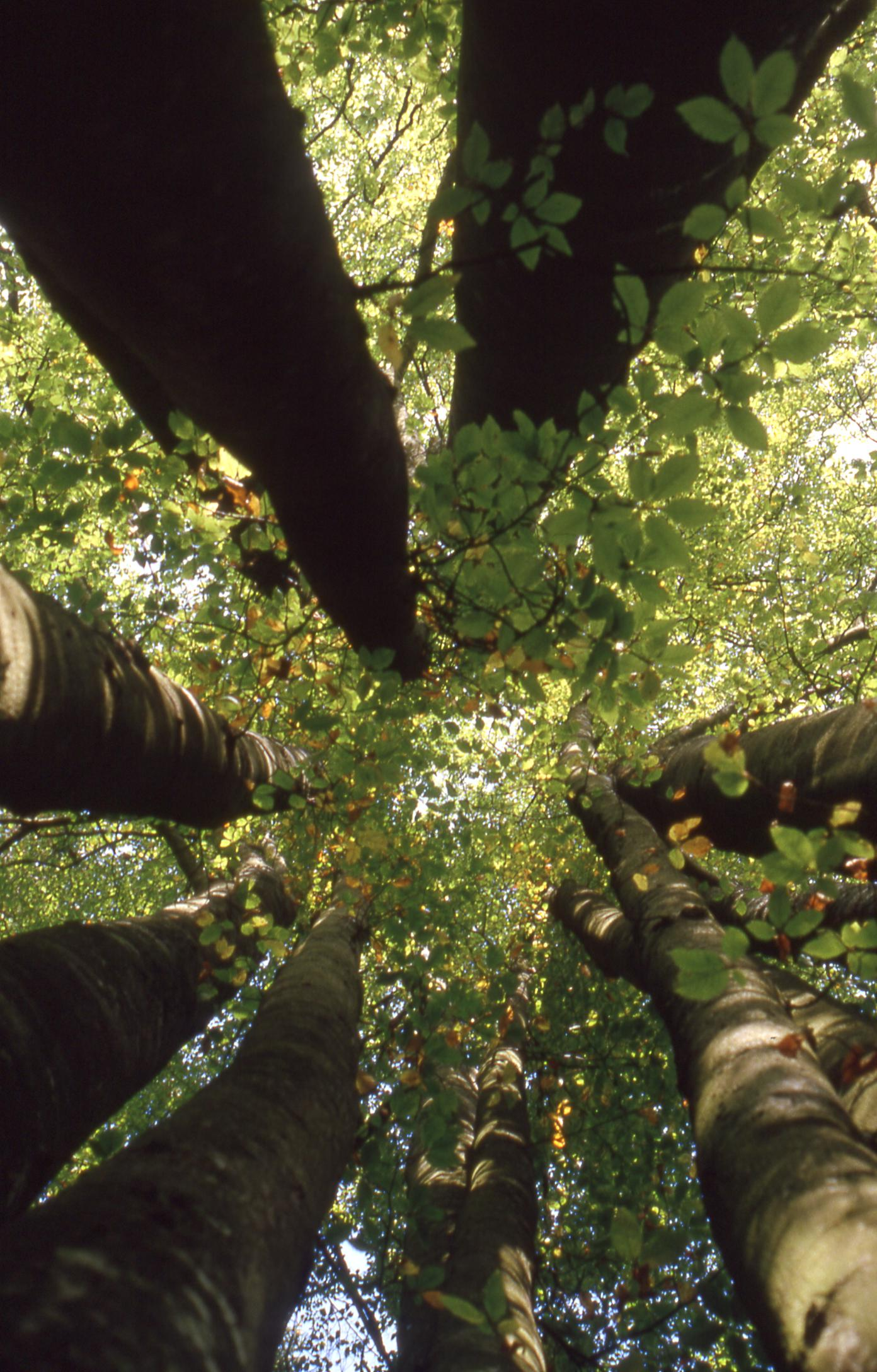 9stämmige Buche in der Wutachschlucht.